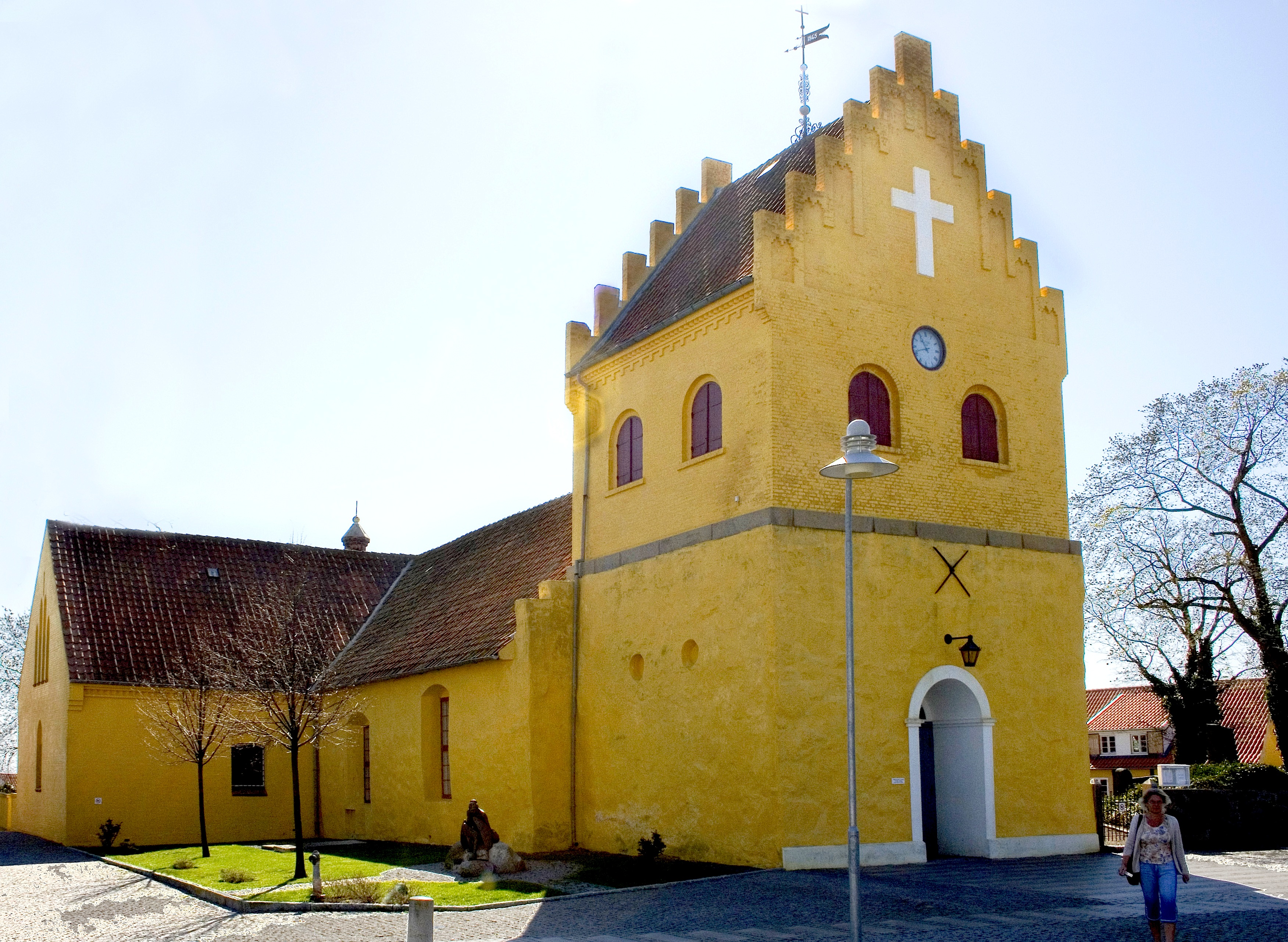 Allinge kirke set fra nordvest